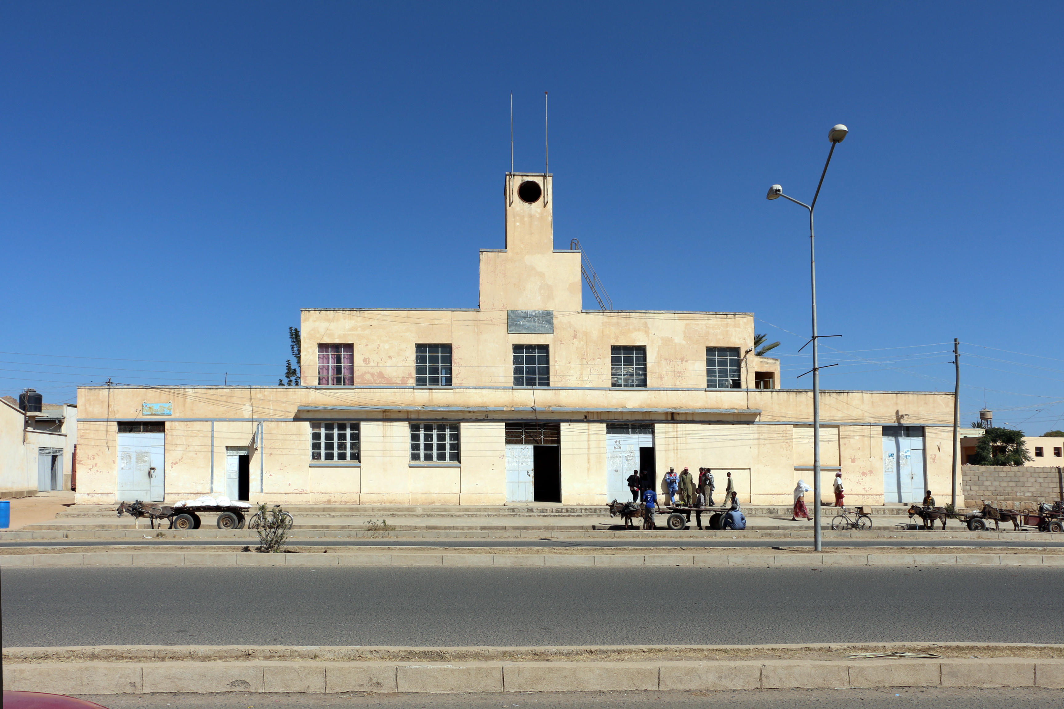 Dekemhare, strada principale 09.JPG